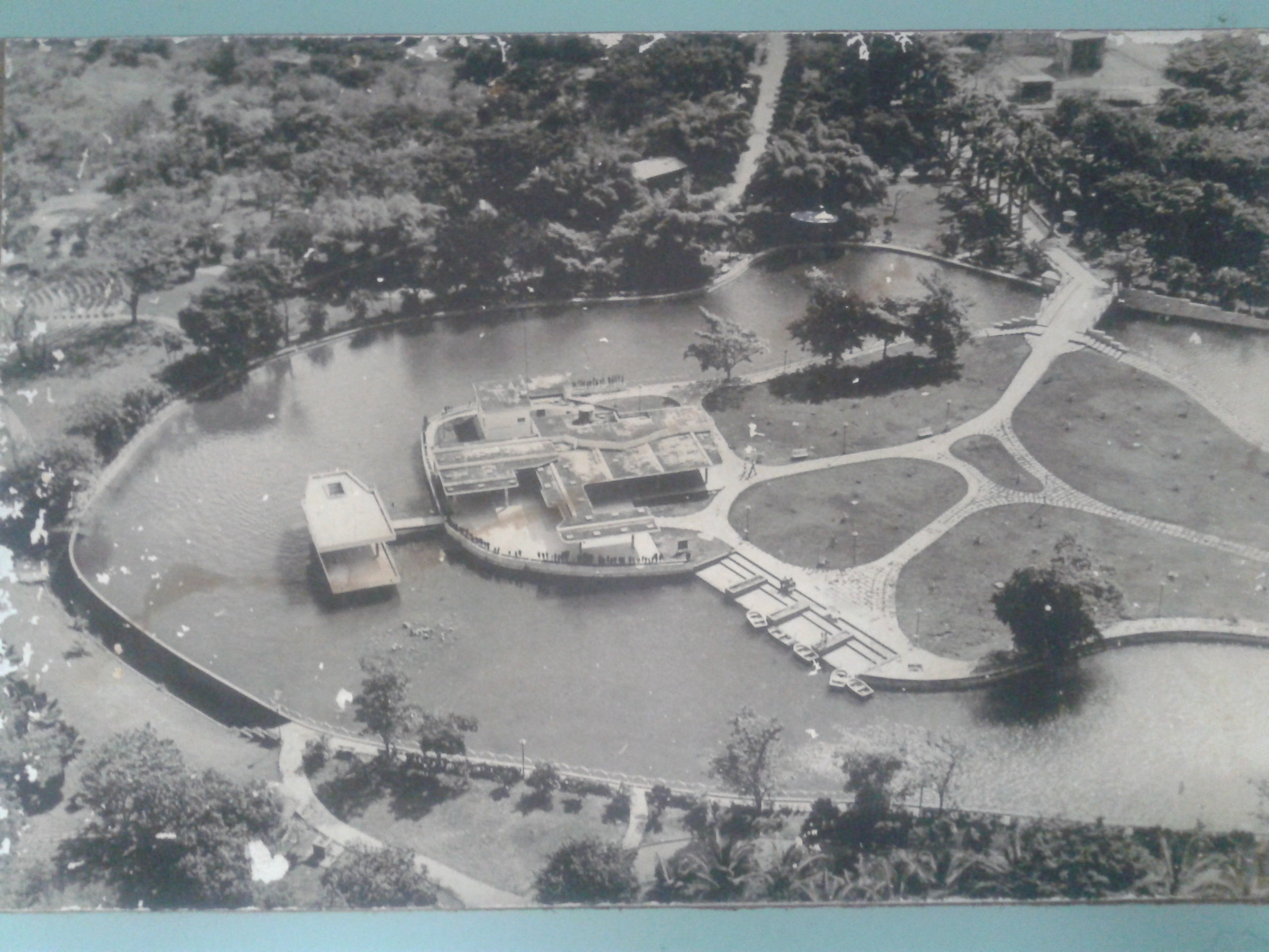 Parque Bararida 1967 (Autor desconocido)